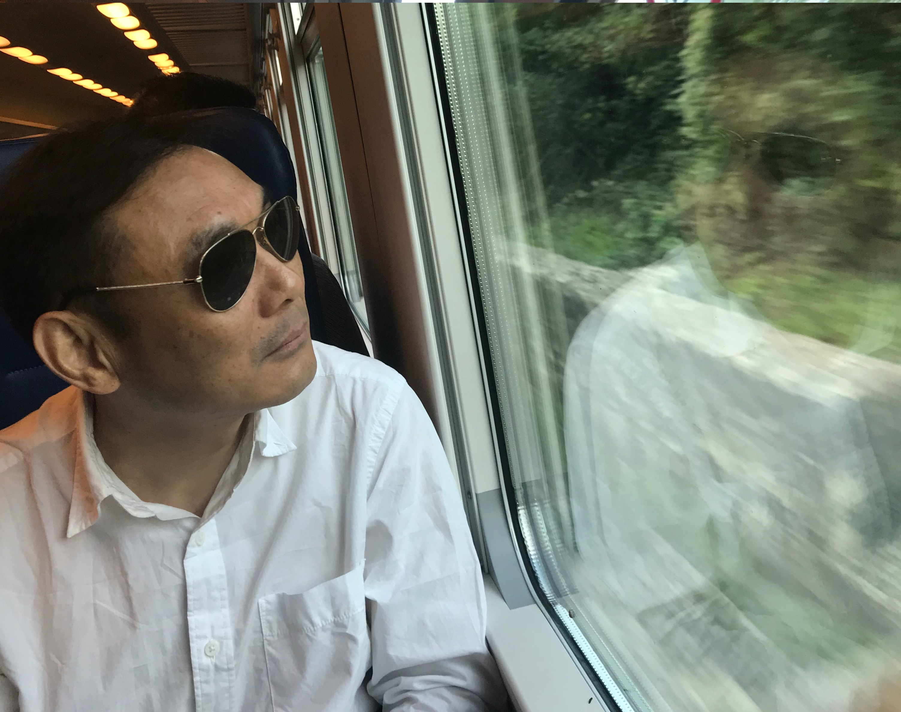 La nuova vita di Dalù in Italia